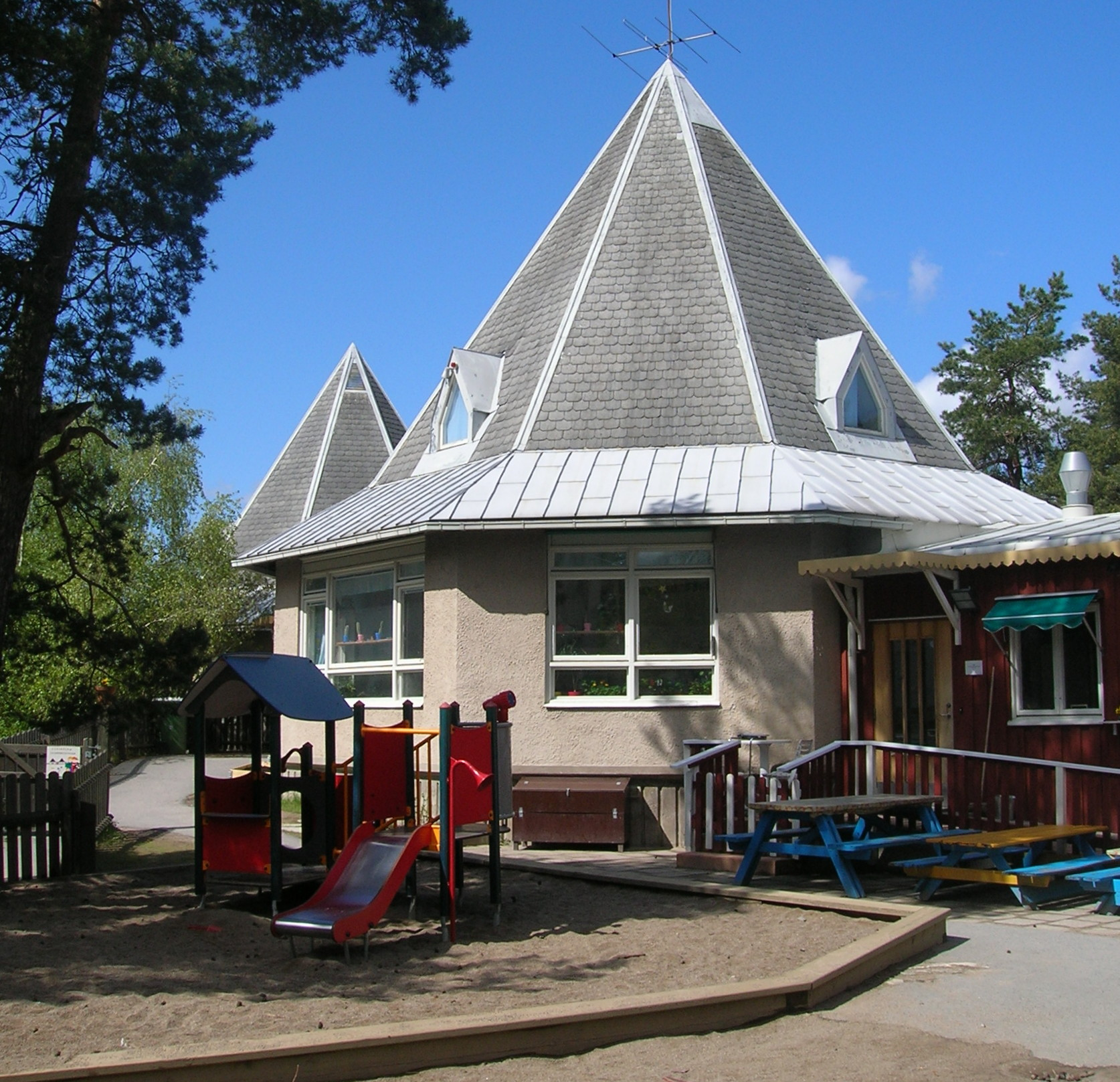 Sköntorpsgården i Årsta, fyra pyramidformiga åttkantiga hus ihopbyggda med varandra. Används som förskola